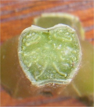 (nl: Adelaarsvaren dwarsdoorsnede stengel) Pteridium aquilinum stem cross section